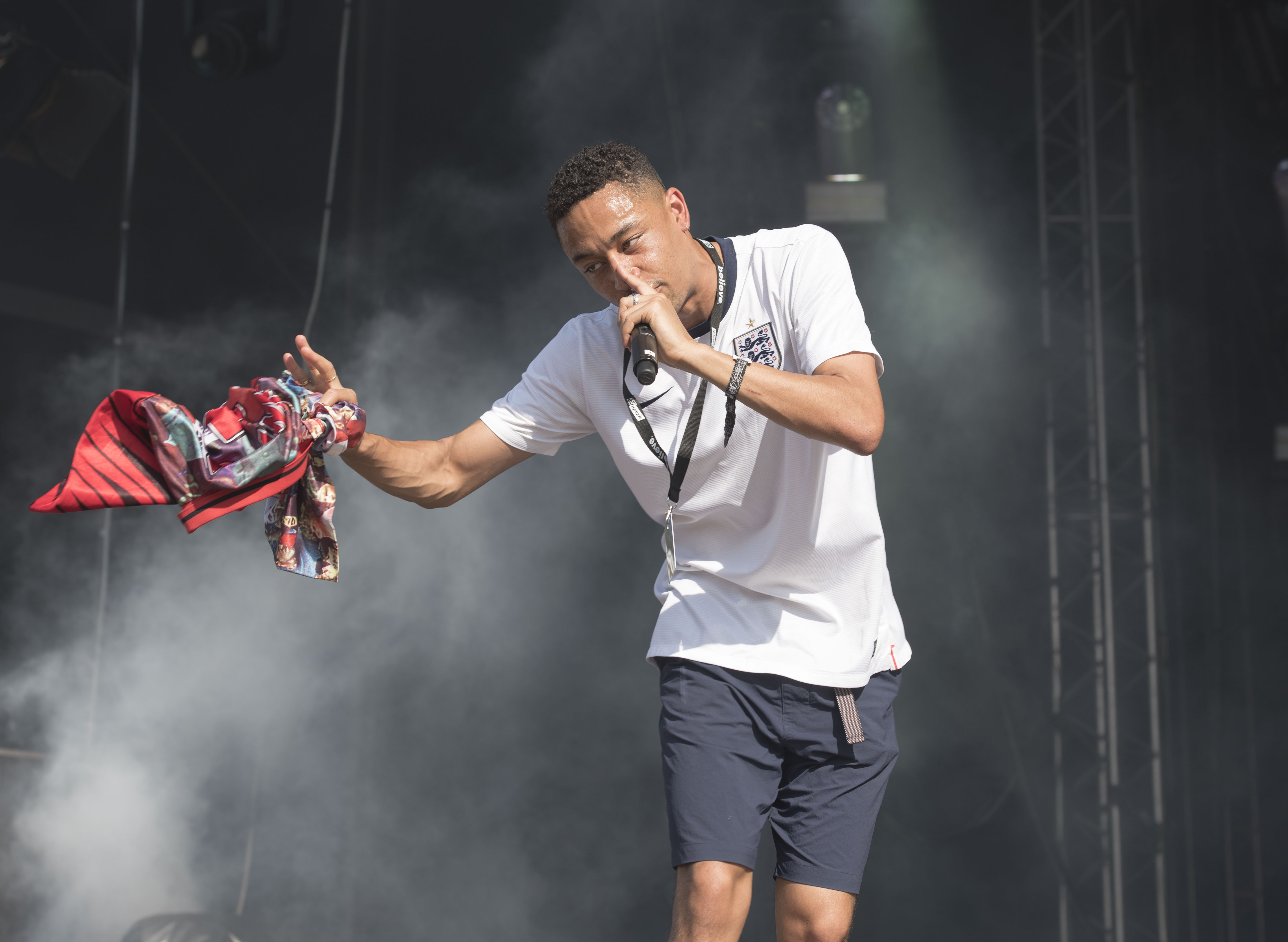 Der britische Grime-Rapper Loyle Carner beim splash! Festival 20 (2017).